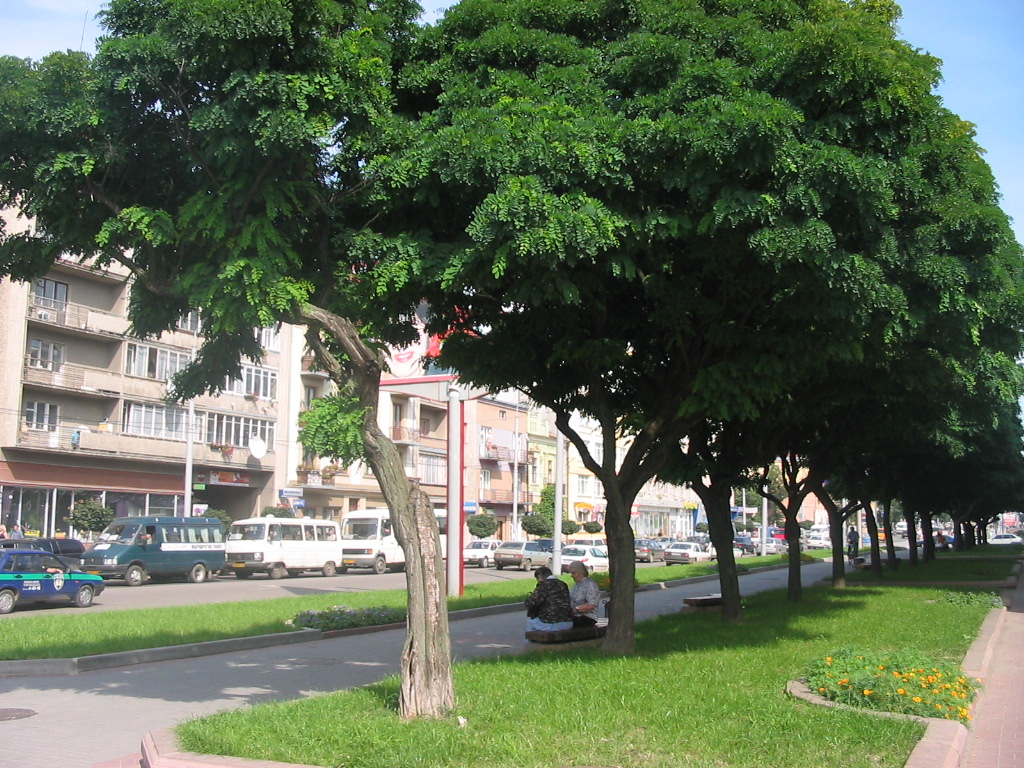 One og key streets in Ivano-Frankivsk, Ukraine